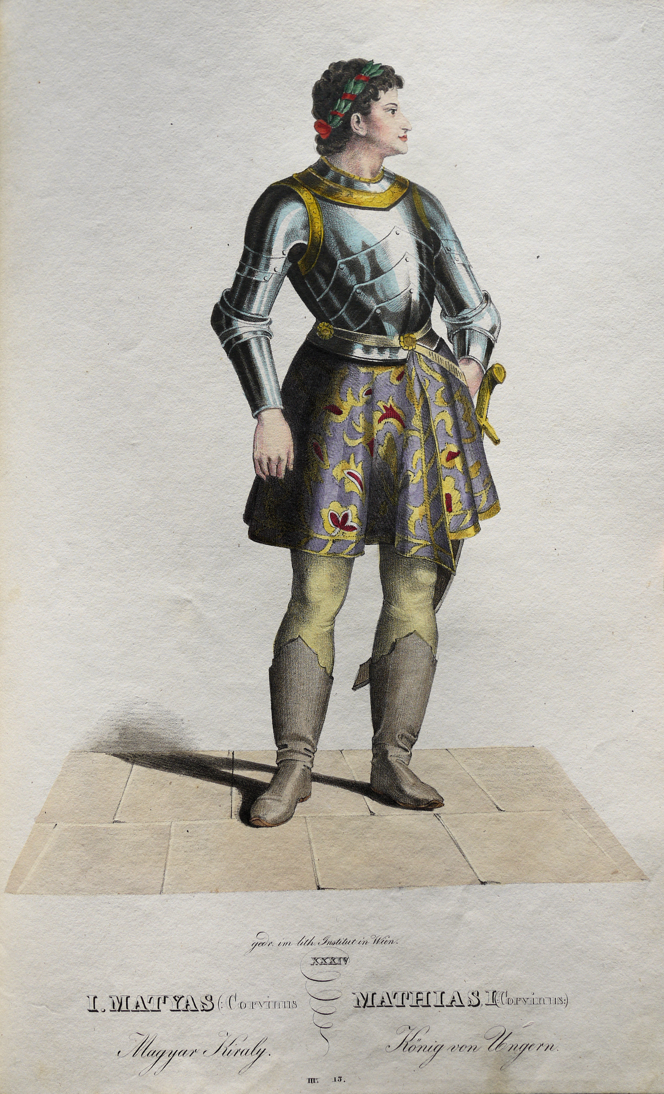 Matthias Corvinus (1443-1490), König von Ungarn etc.. Lithographie von Josef Kriehuber nach einer Zeichnung von Moritz von Schwind aus Ungerns Erste Heerführer Herzoge und Koenige In einer Reihe von Bildnissen von Bela bis auf Seine Majestät Franz I. Kaiser Von Österreich König Von Ungern &c., &c. Wien : Lithographisches Institut ;ca. 1828